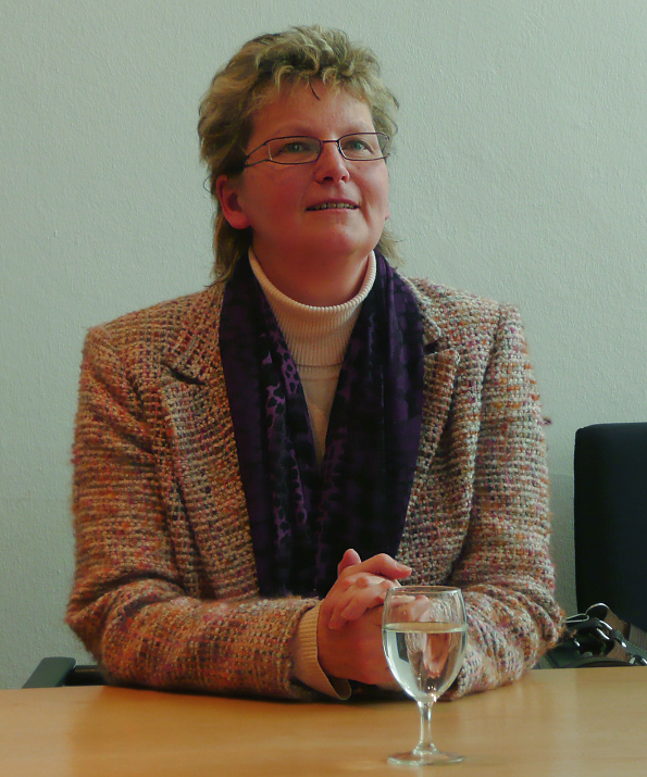 Mechthild Ross Luttmann ,deutsche Politikerin (CDU), niedersächsisches Sozialministerin